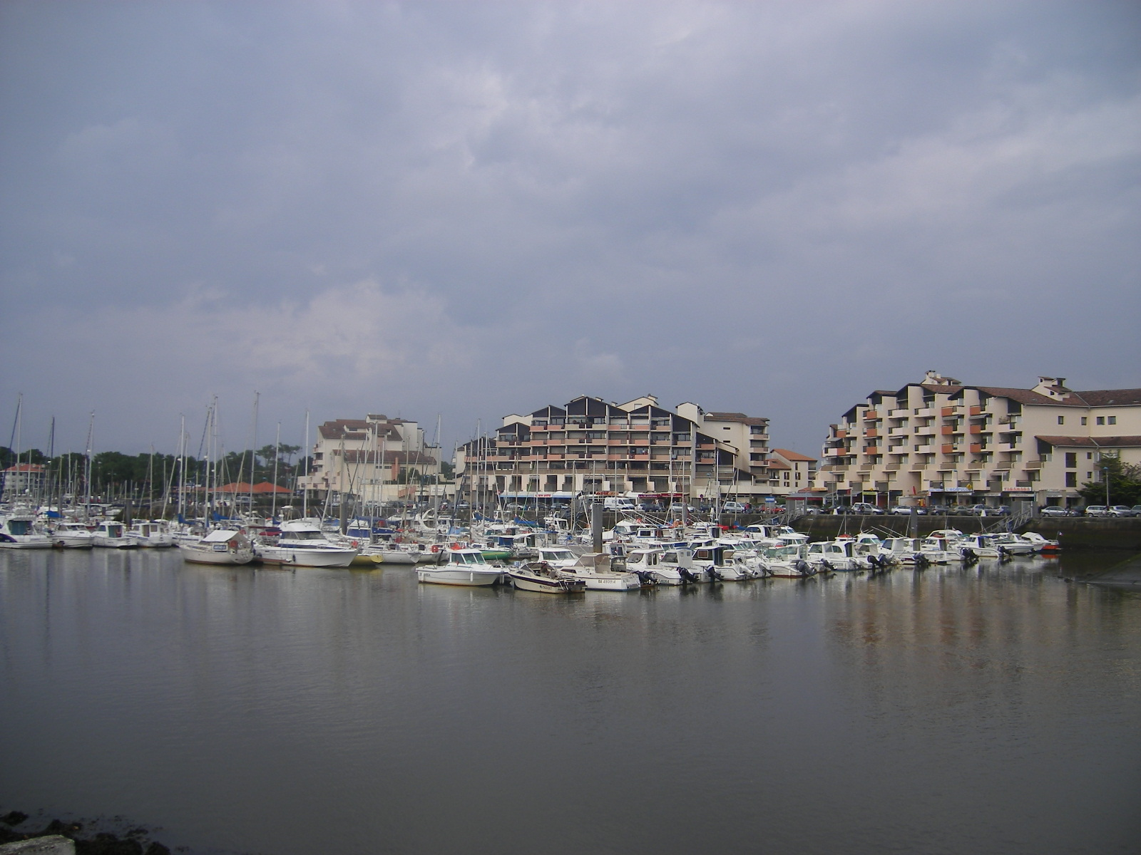 Capbreton